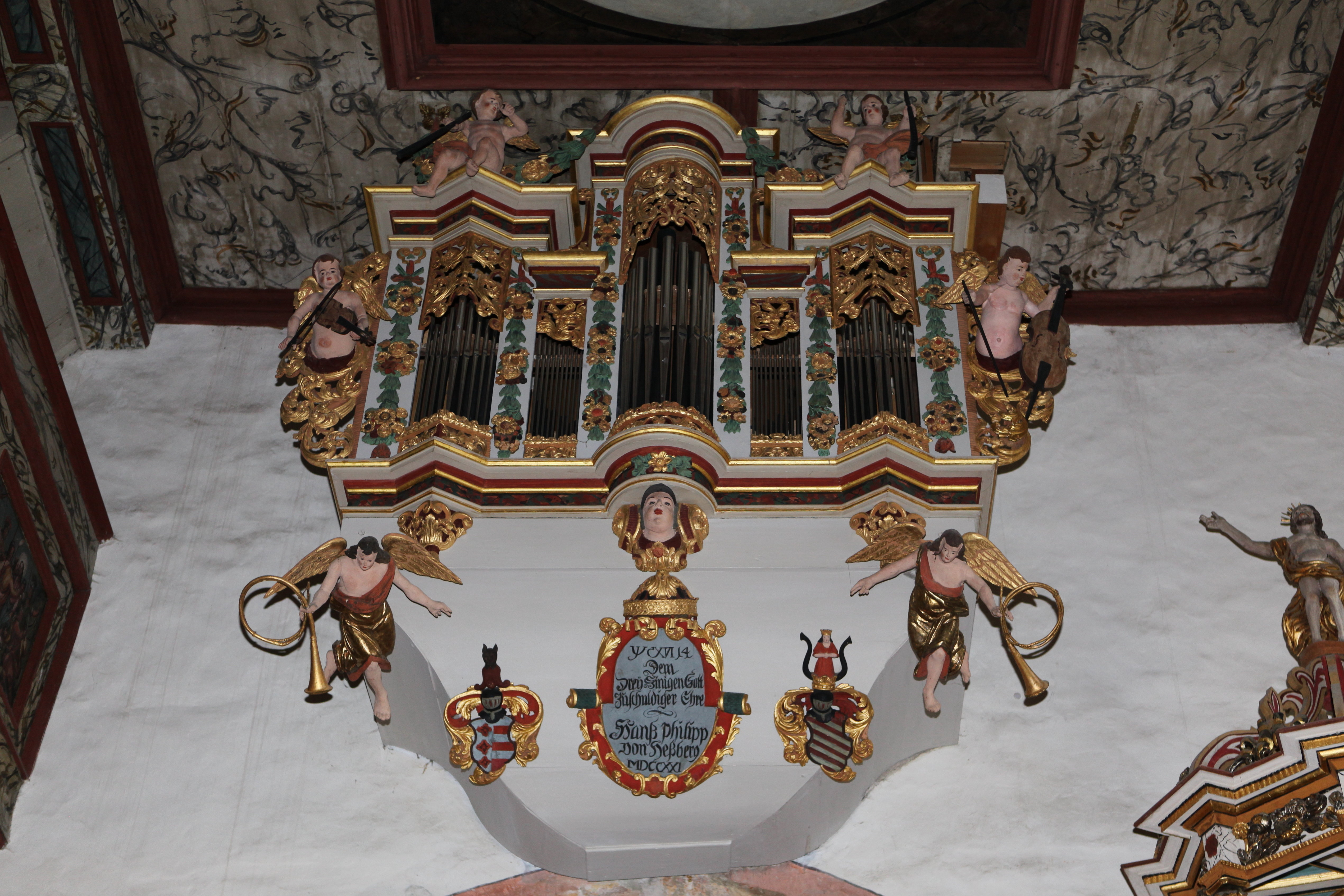 Bedheim-St.Kilian-Schwalbennestorgel